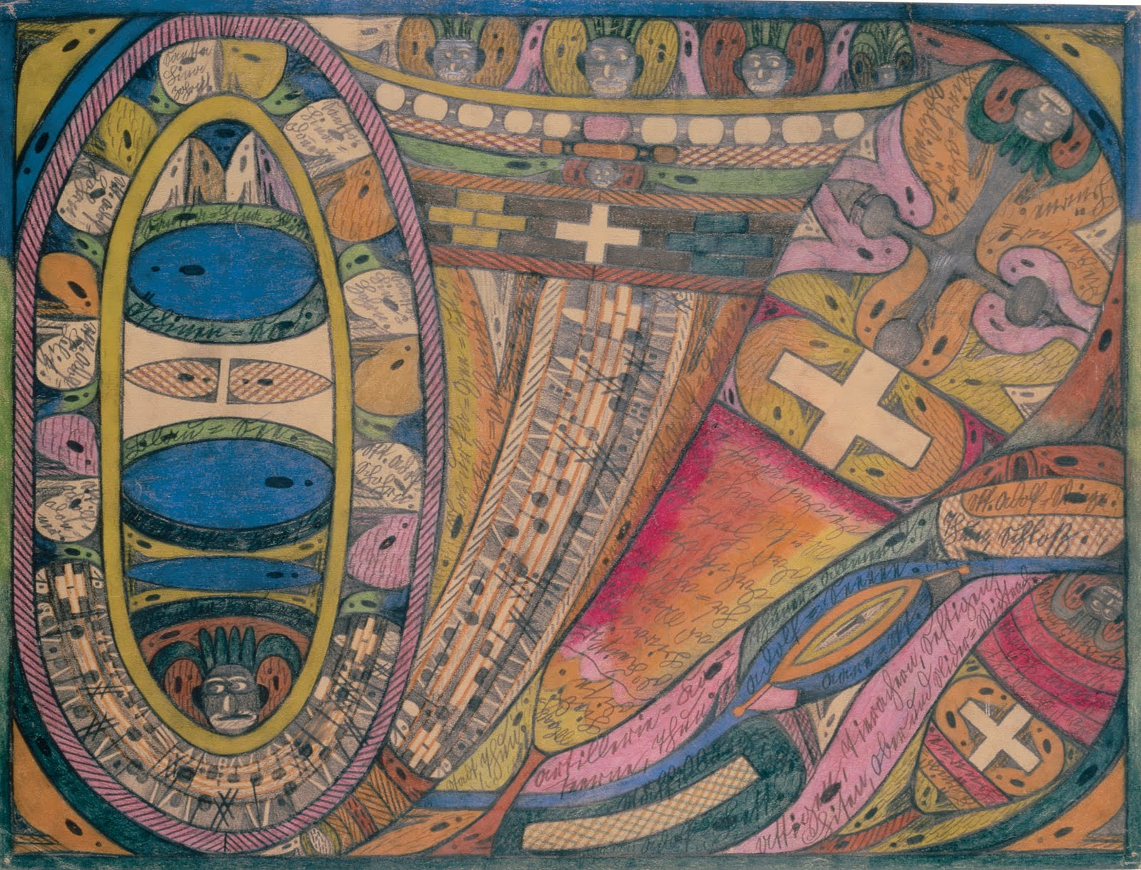 Zeichnung von Adolf Wölfli